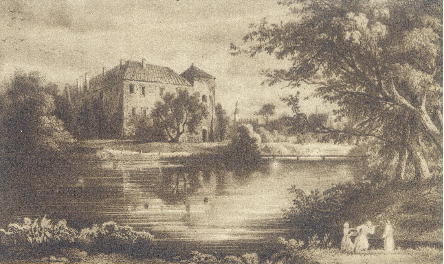 Castle in Szydlowiec in 1880